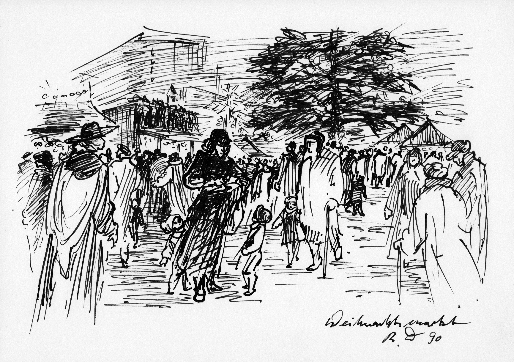 Weihnachtsmarkt Chemnitz